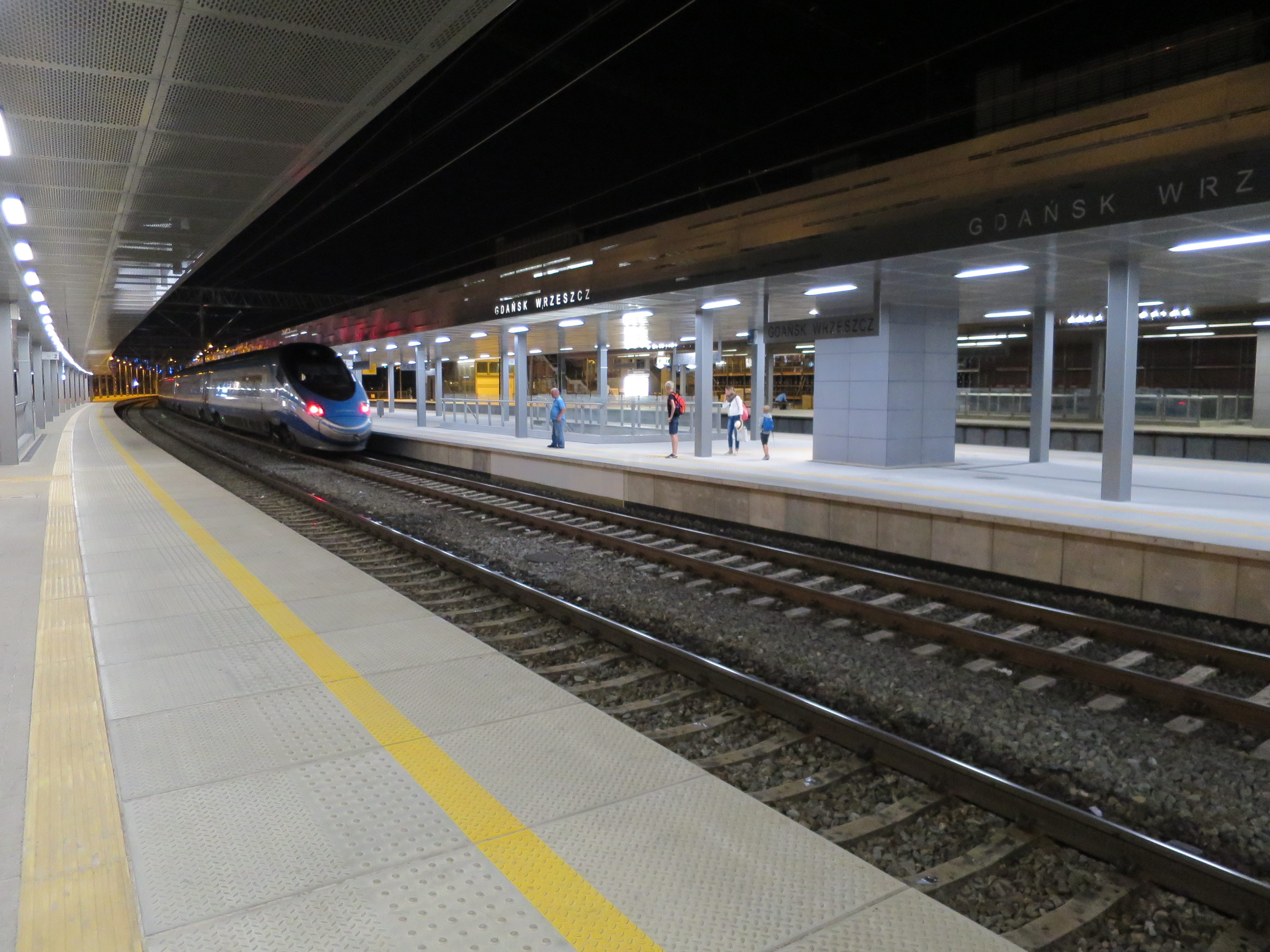 Stacja Gdańsk Wrzeszcz. This photo was taken during Railway Wikiexpedition 2015 set up by Wikimedia Polska Association in cooperation with Fundacja Grupy PKP. You can see all photographs in category Wikiekspedycja kolejowa 2015.